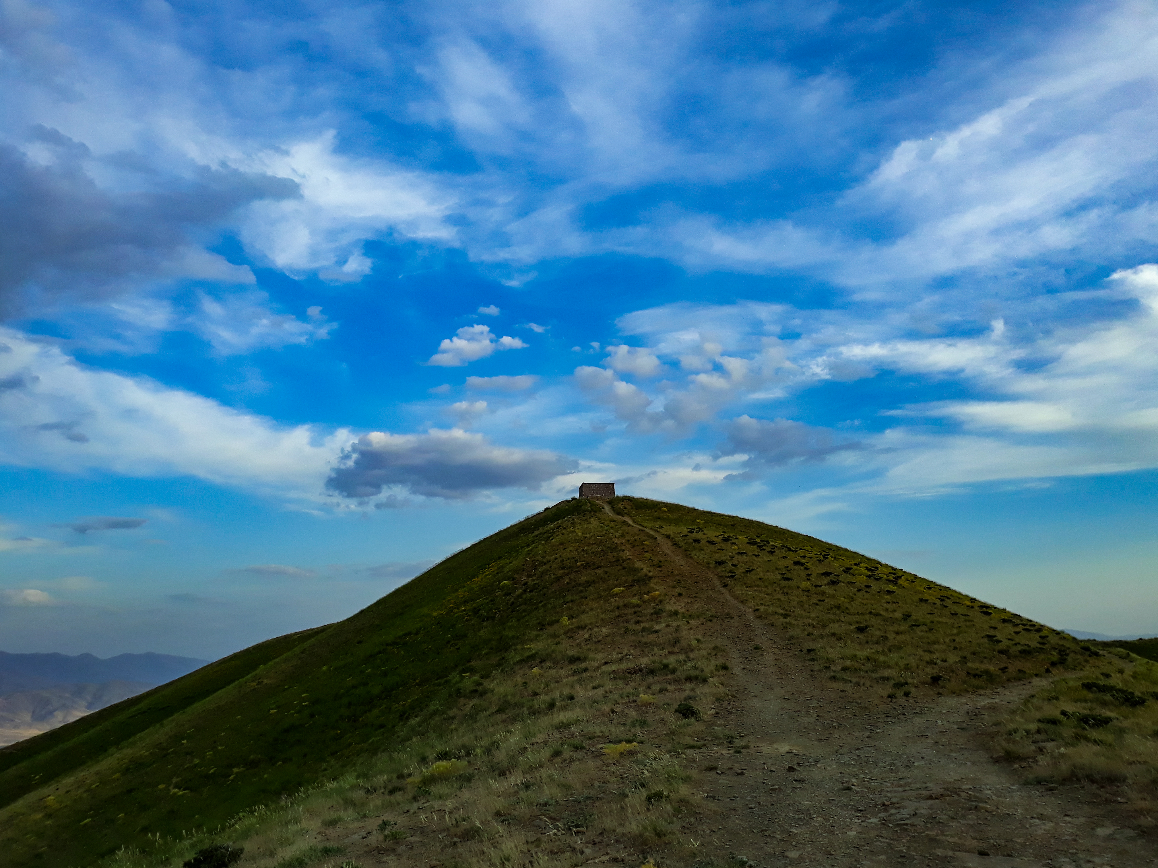 قله آبیدر کوچک